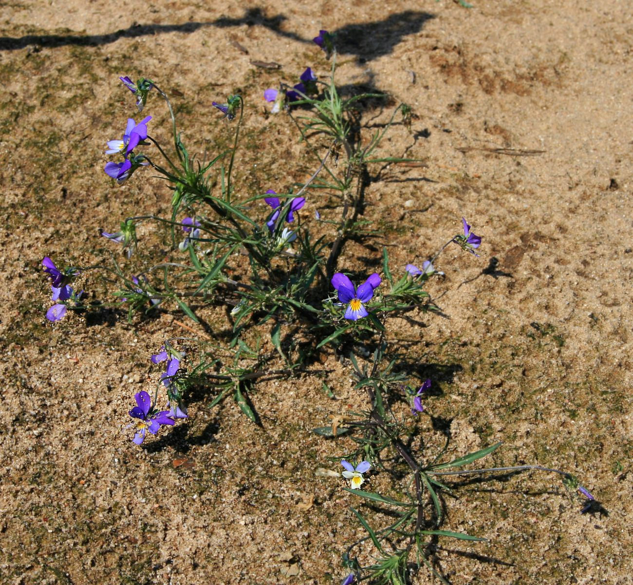 Wild-Stiefmütterchen (Viola tricolor subsp. tricolor), Veilchengewächse (Violaceae) – Österreich/Austria/Autriche: Niederösterreich, Marchtal, „In den Sandbergen“ ESE Waltersdorf an der March